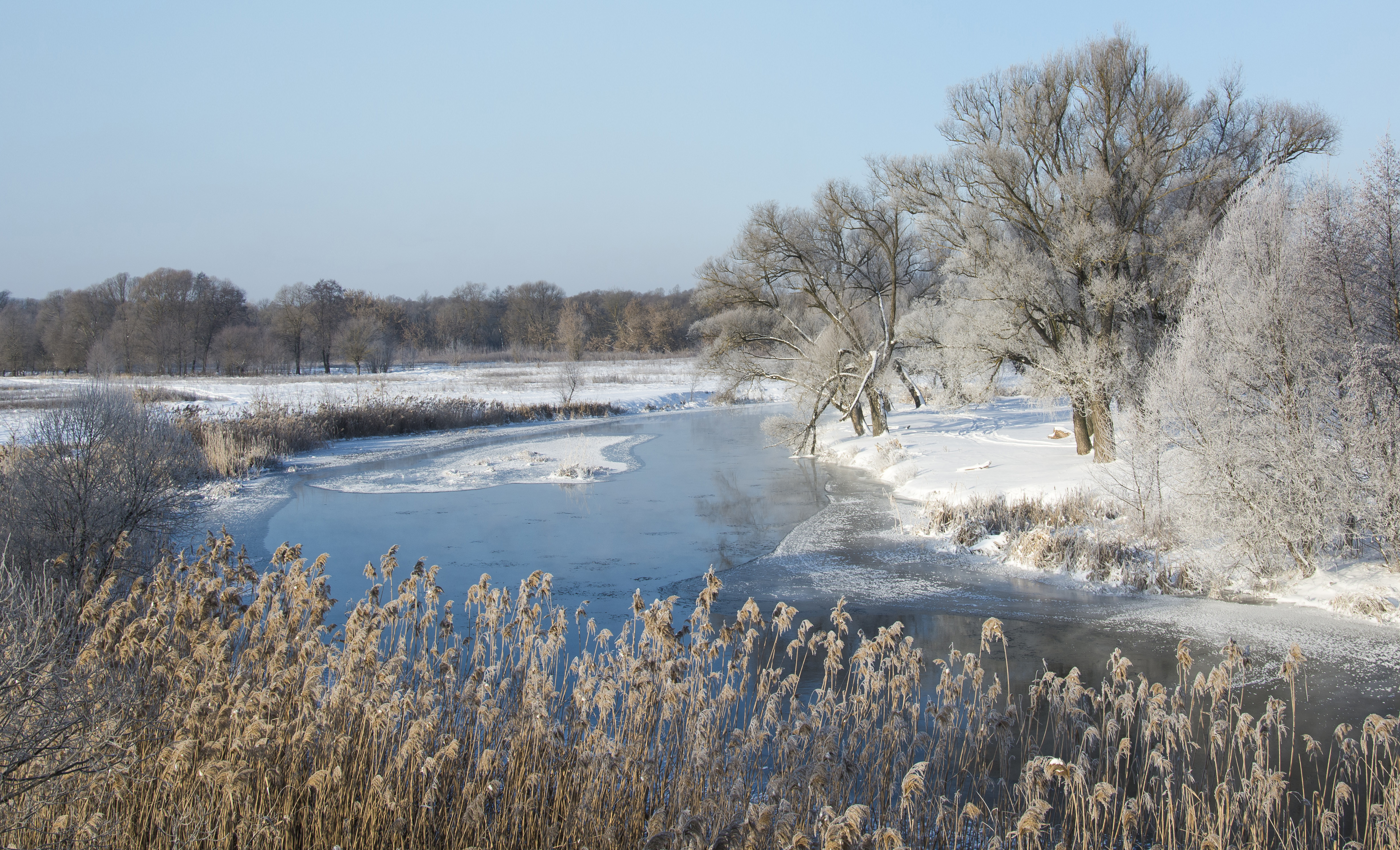 Река Нежеголь зимой. Шебекинский район Белгородской области.